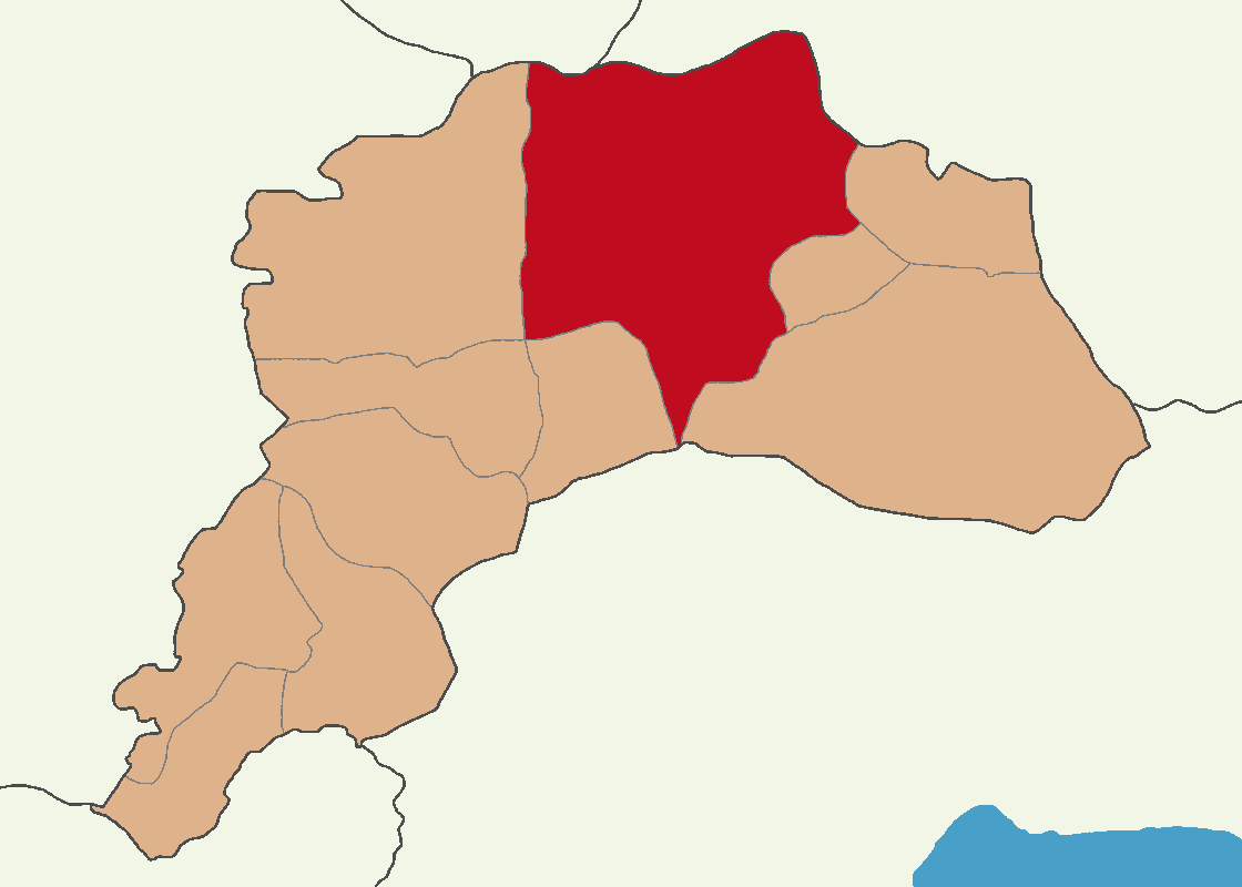 Burdur Merkez ilçesinin konumu